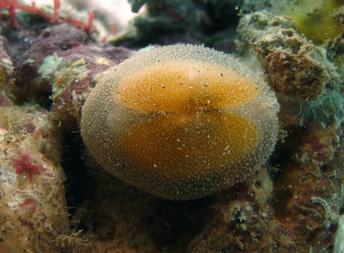 Amphilepida aurantia à la Réunion.